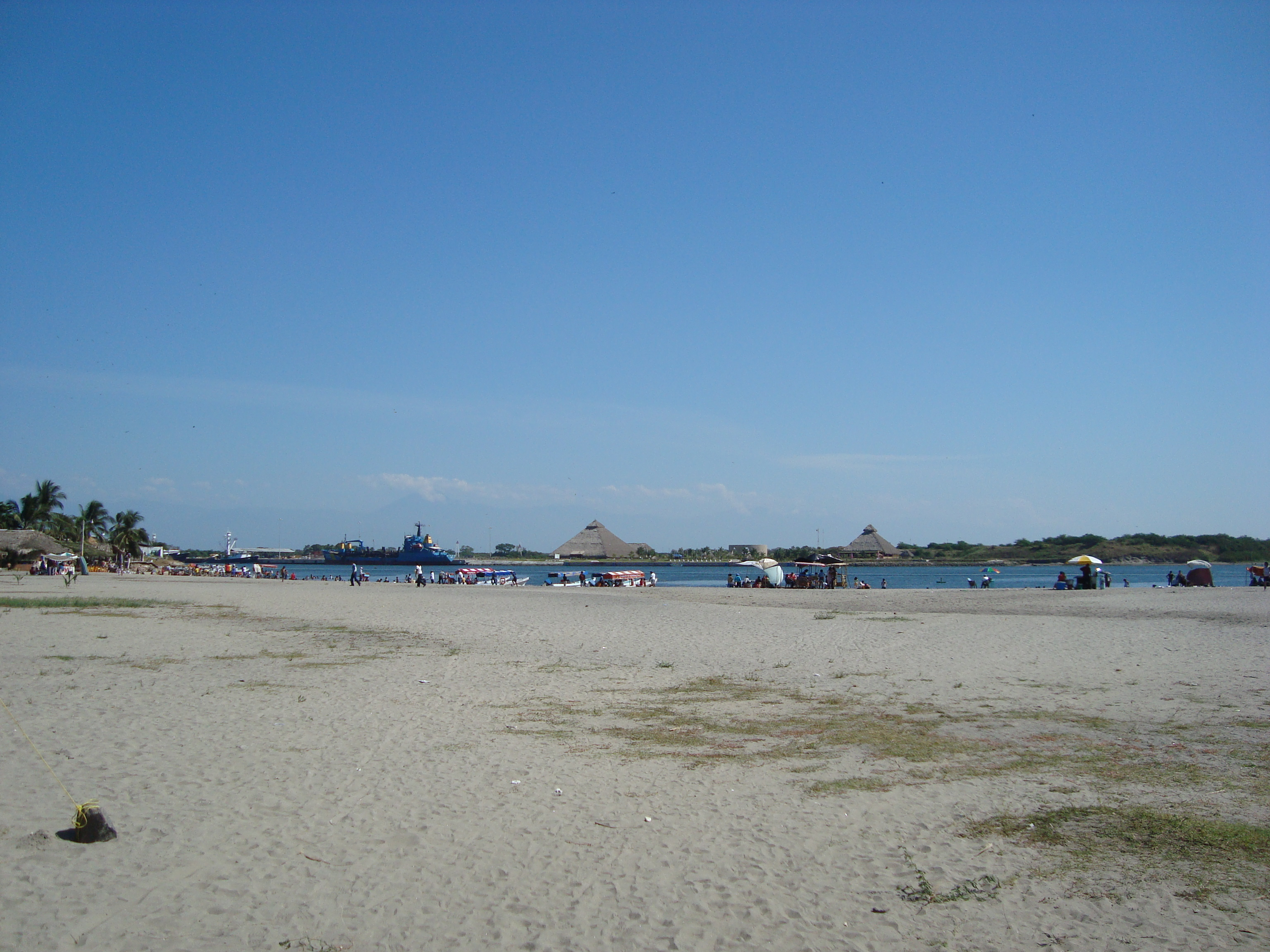 Imagen de flickr